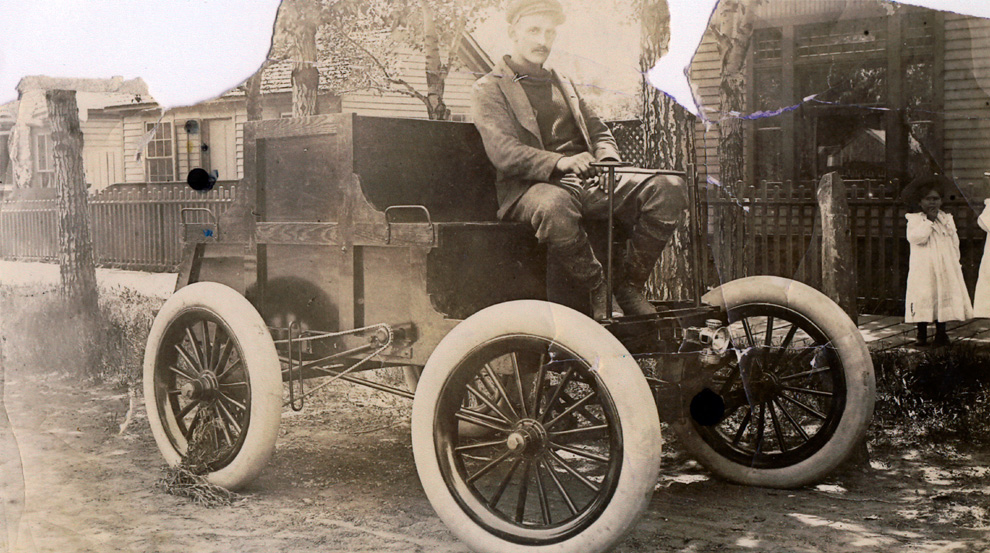 Elmer Lovejoy (1872-1960), US-amerikanischer Erfinde